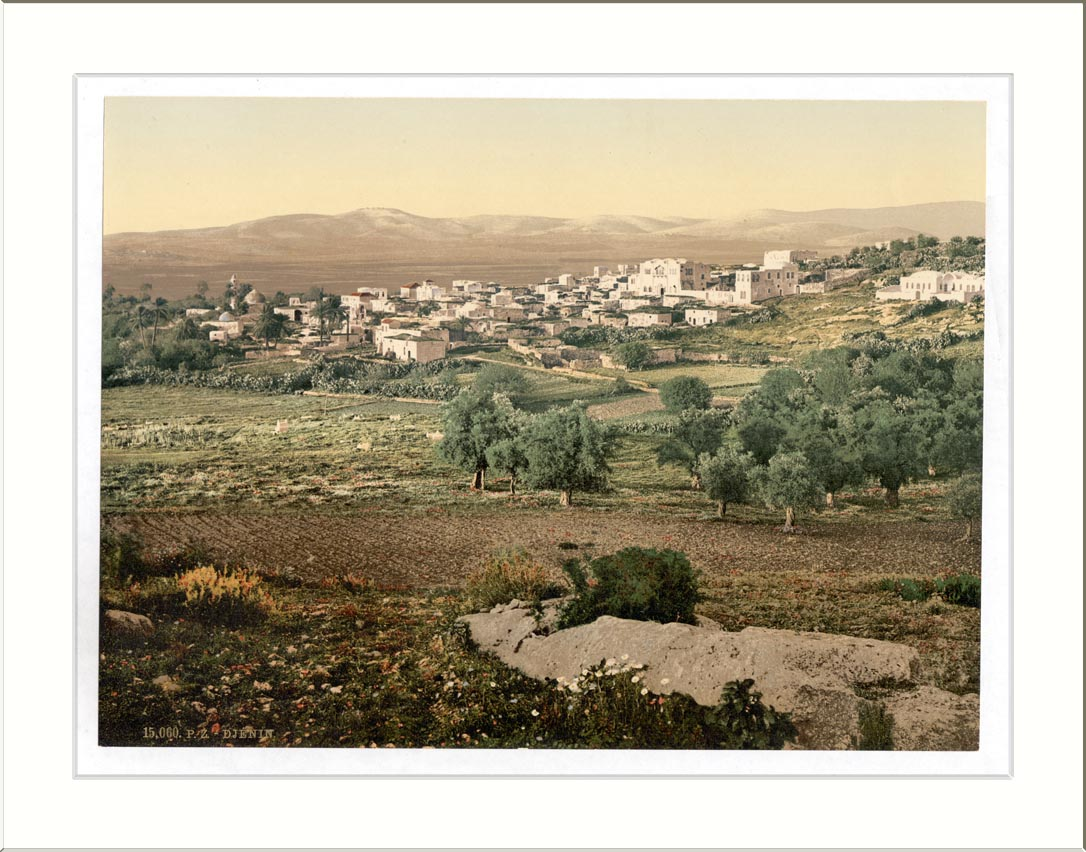 General view Jenin Holy Land (i.e. West Bank)